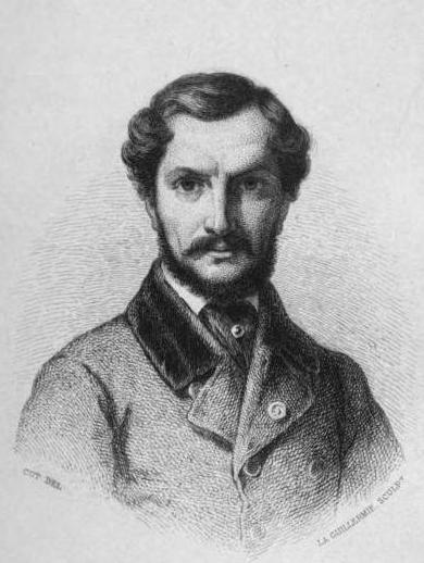 "Portrait de Francisque Duret gravé, d'après un dessin de Pierre Auguste Cot, par M. La Guillermie."